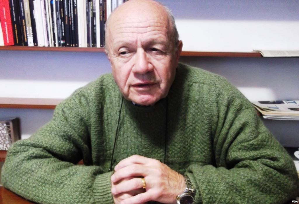 Türk toplumbilimci İsmail Beşikçi.